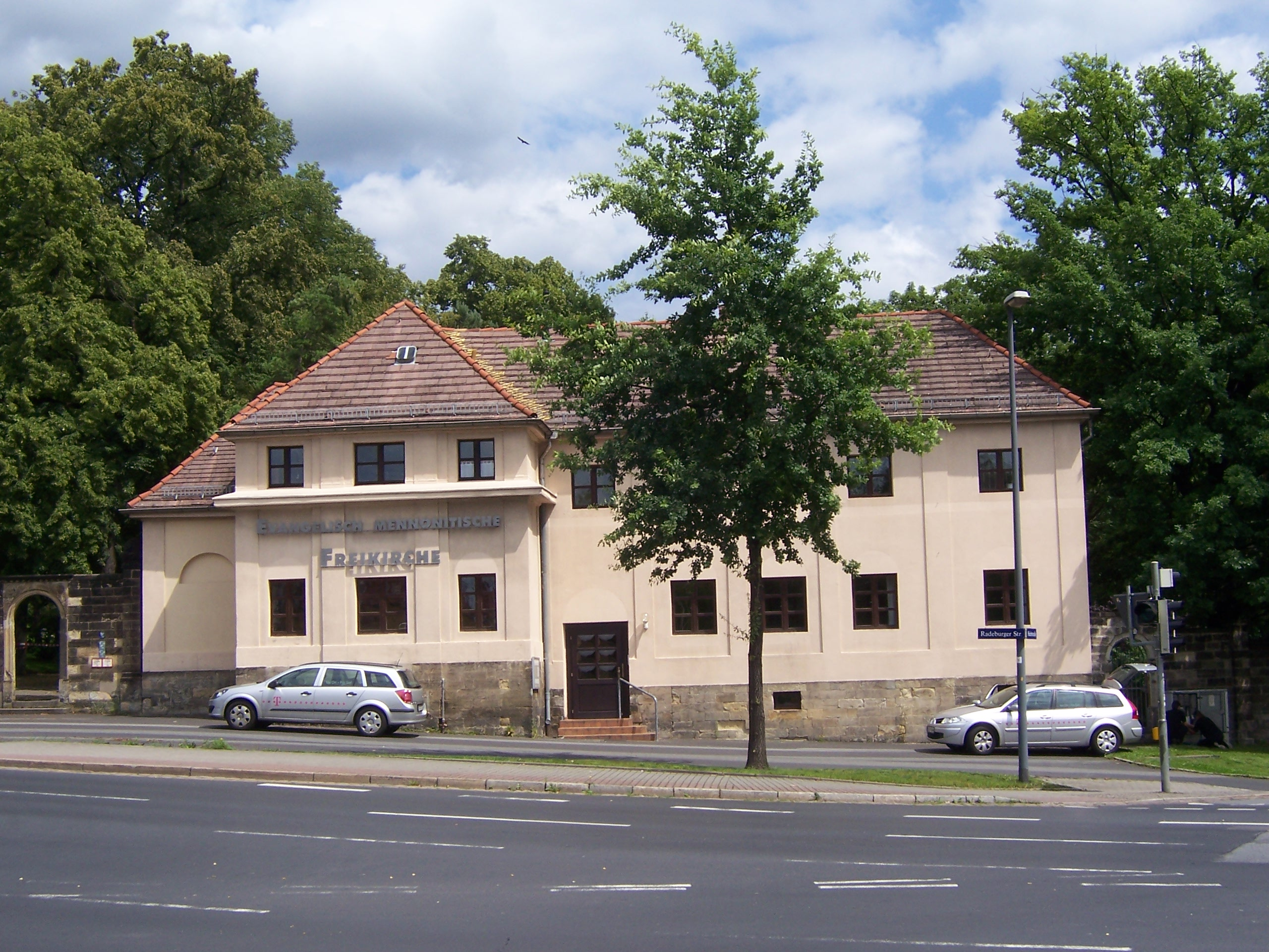 Gebäude der Evangelisch Mennonitischen Freikirche in Dresden. Hechtstraße 78a, Leipziger Vorstadt